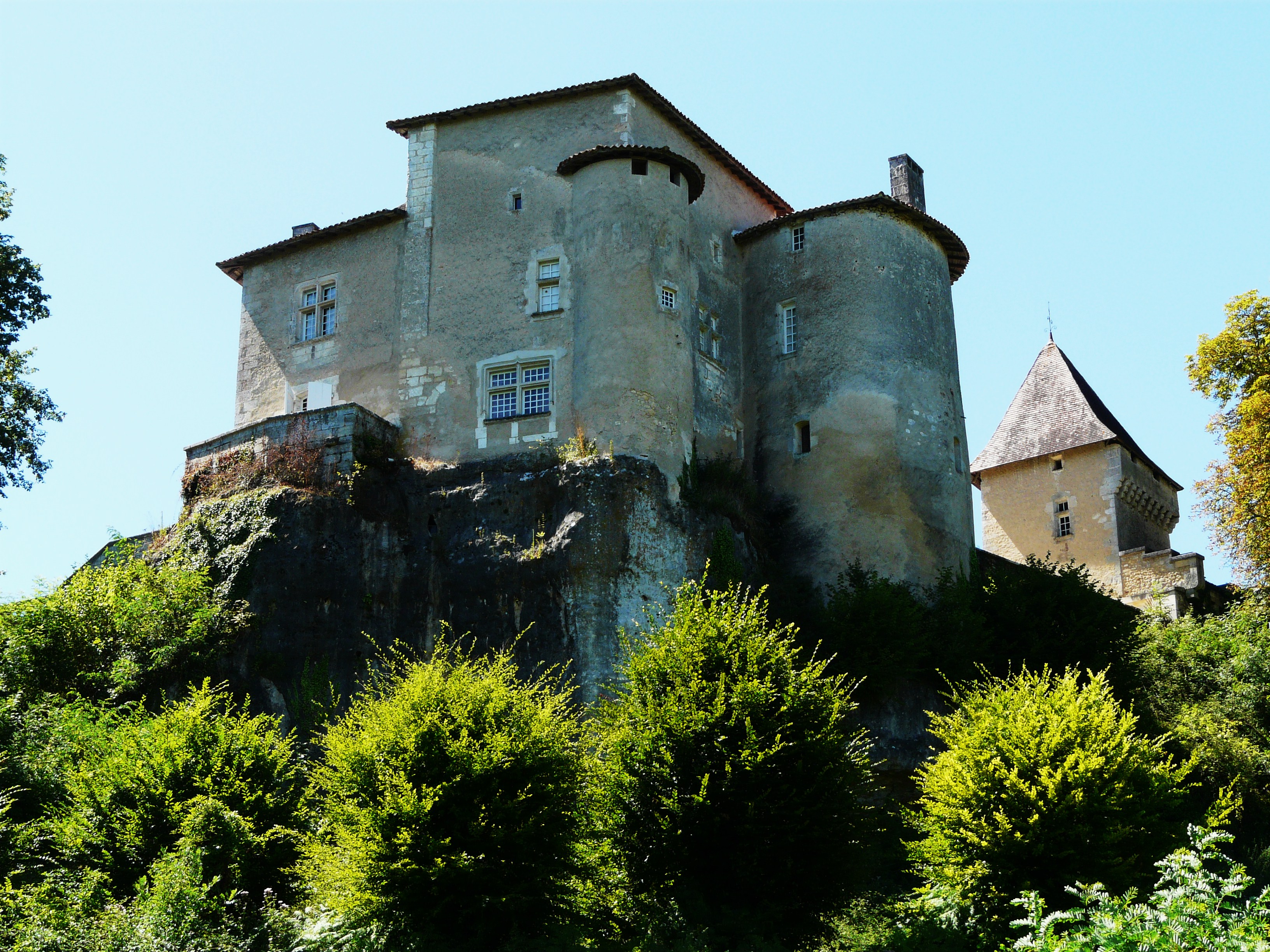 Château de Ramefort à Valeuil, Dordogne, France Object location45° 20′ 44″ N, 0° 37′ 26.3″ E It is indexed in the Base Mérimée, a database of architectural heritage maintained by the French Ministry of Culture, under the references PA00083043 and IA24001158.